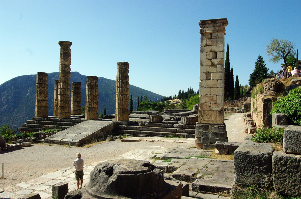 Delphi, Tempel des Apollo